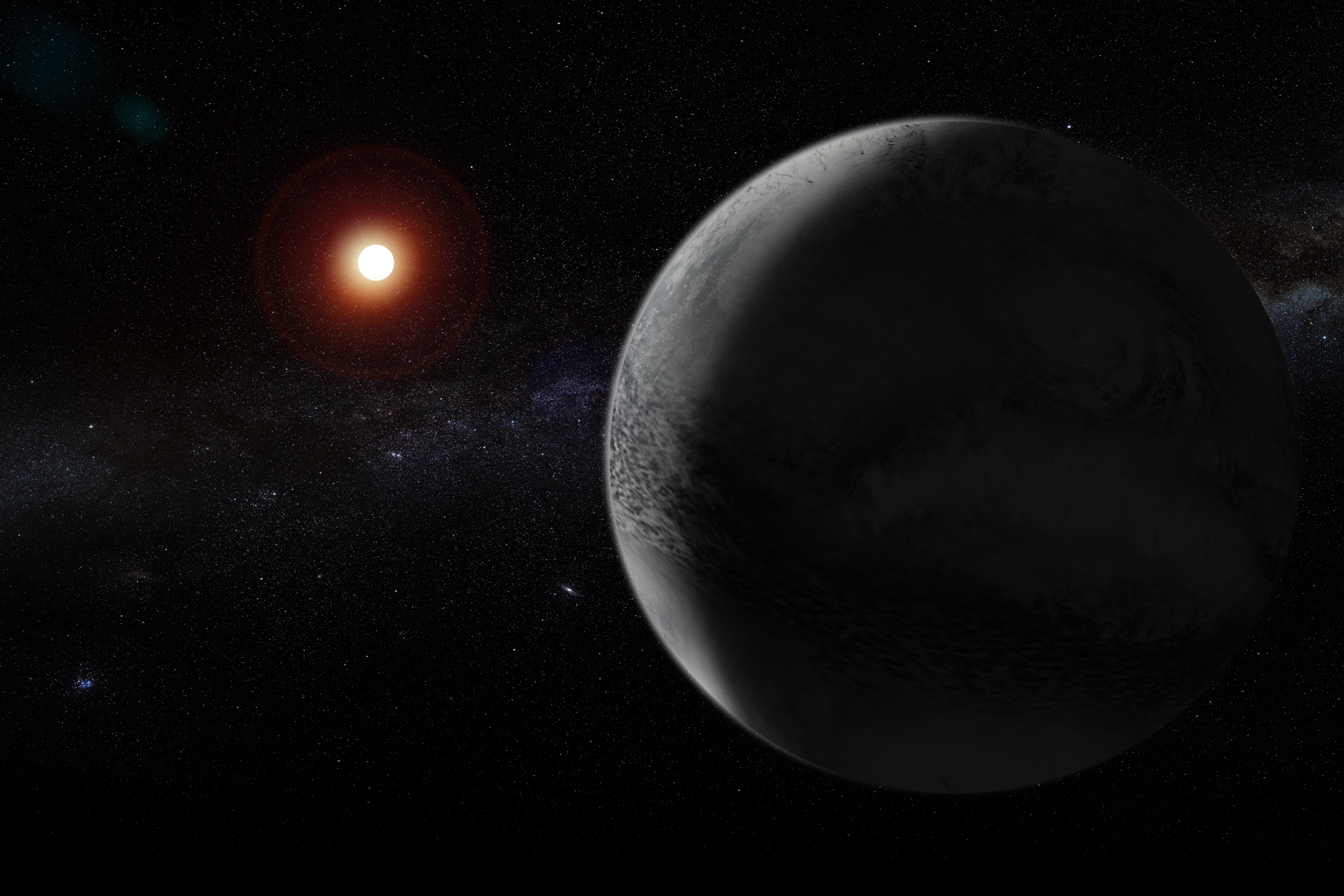 Exo-Planet K2-18b - Künstlerische Darstellung; A. Stelter